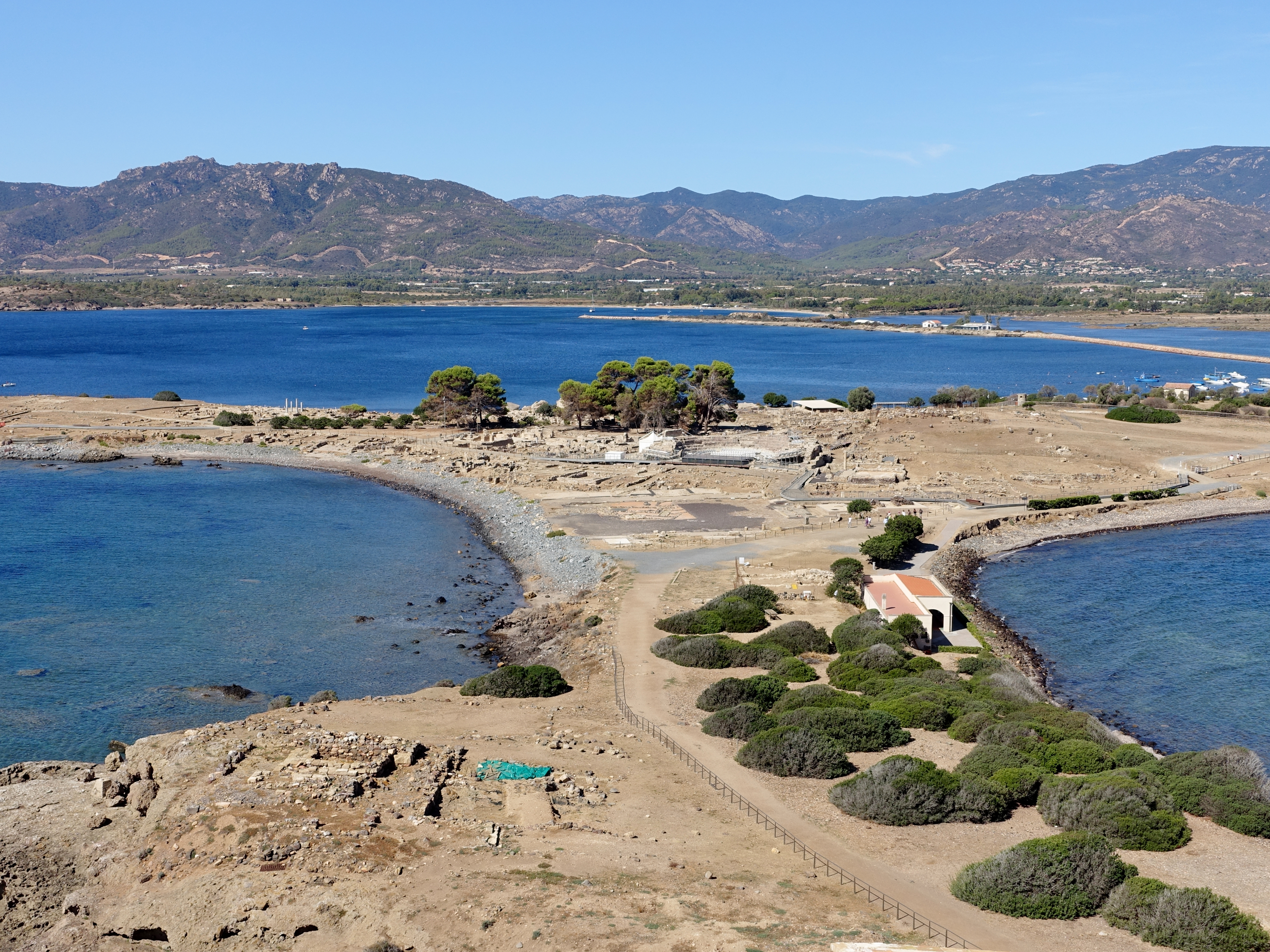 Archäologische Ausgrabungsstätte von Nora, Gemeinde Pula, Sardinien, Italien